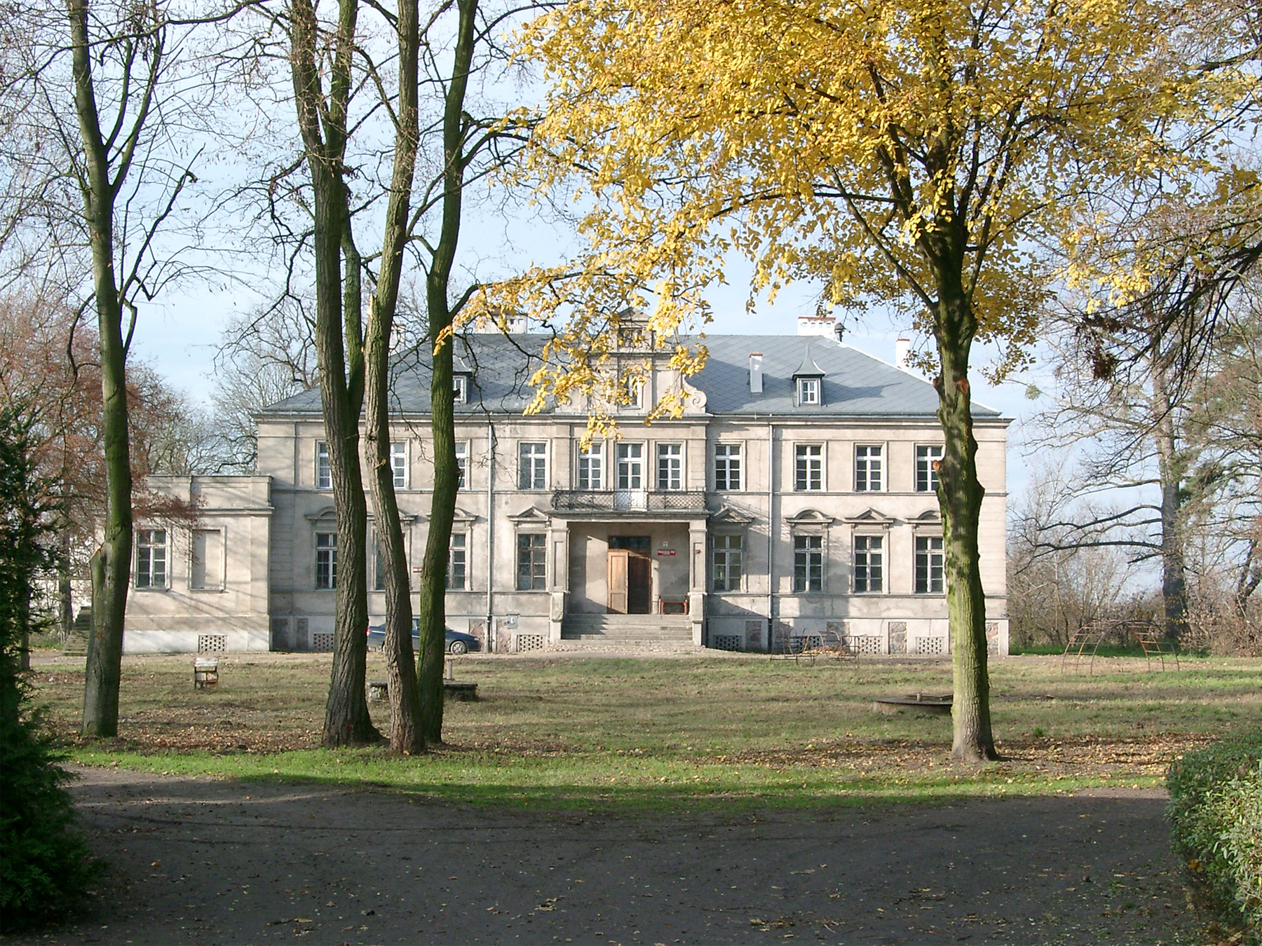 Pałac w Niegolewie